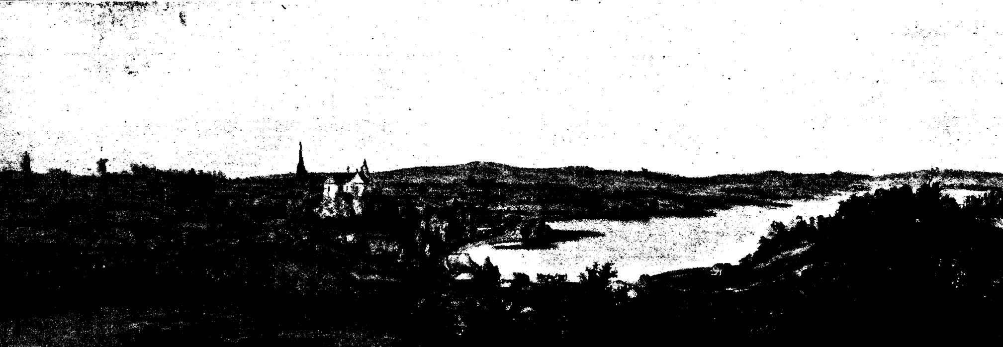 Беларуская (тарашкевіца): Сенна (Sienna). Панарама